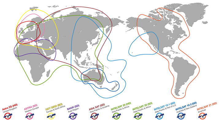 아리랑TV_방송권역_10개 위성